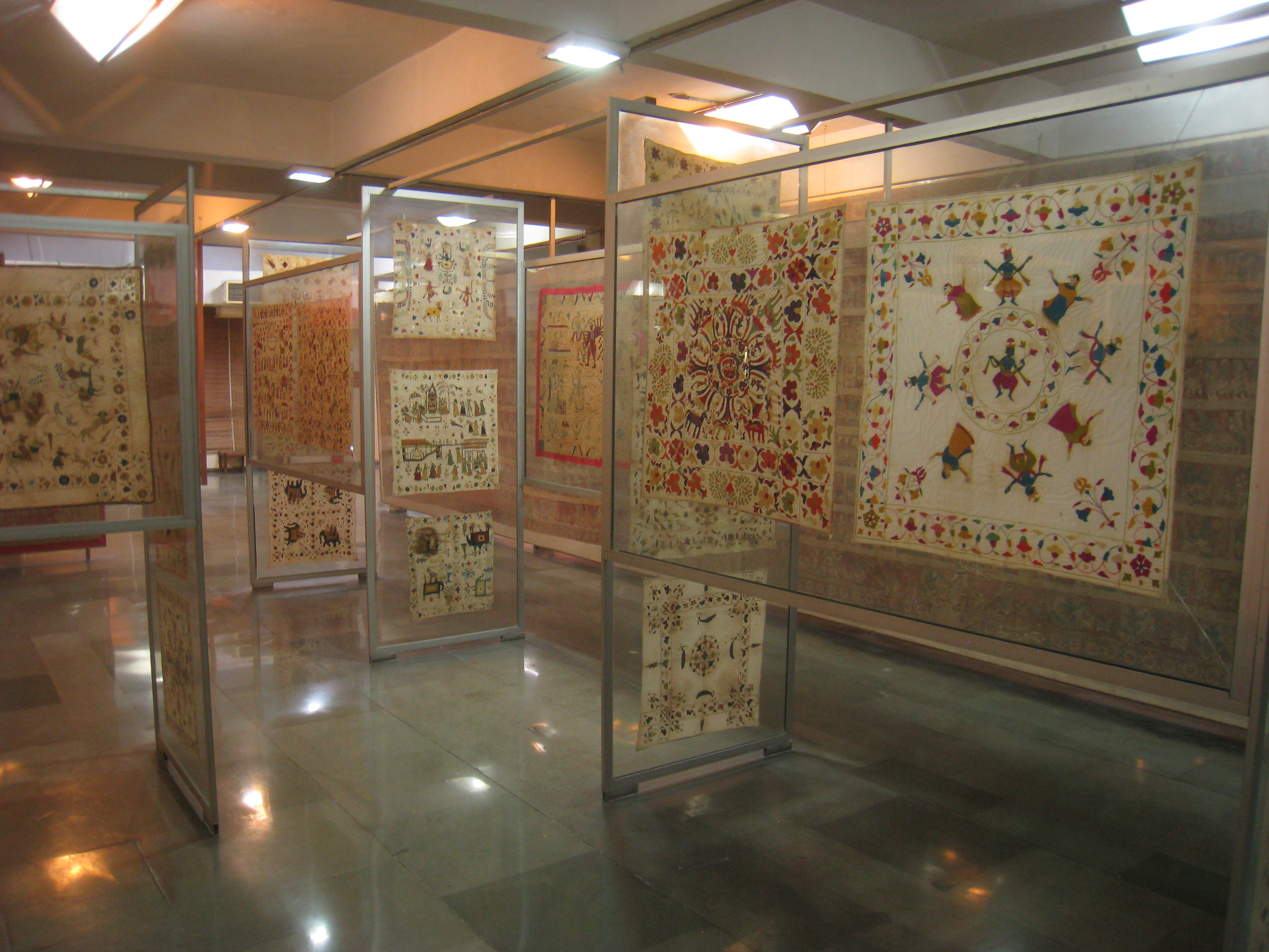 Exhibit in Crafts Museum, New Delhi, India.